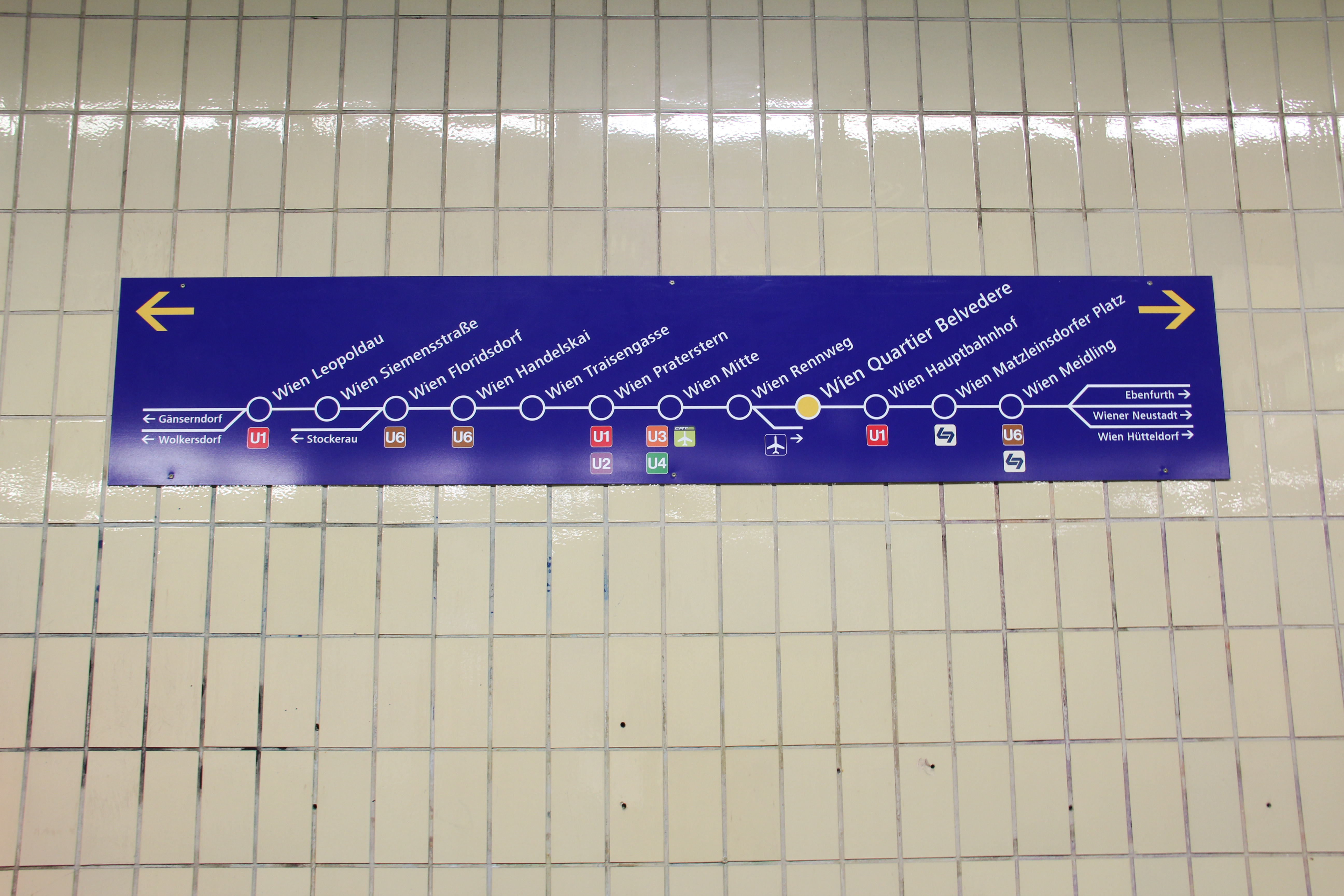 Ein Übersichtsplan der Wiener S-Bahn Stammstrecke, der in der Haltestelle Wien Quartier Belvedere zu sehen ist.